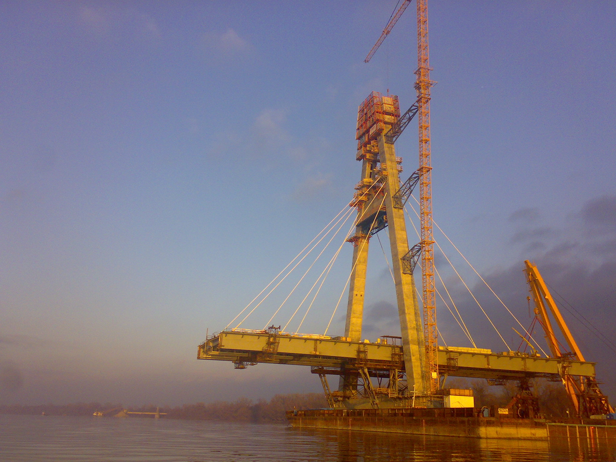 Az épülő Megyeri-híd naplementekor (Budapest)